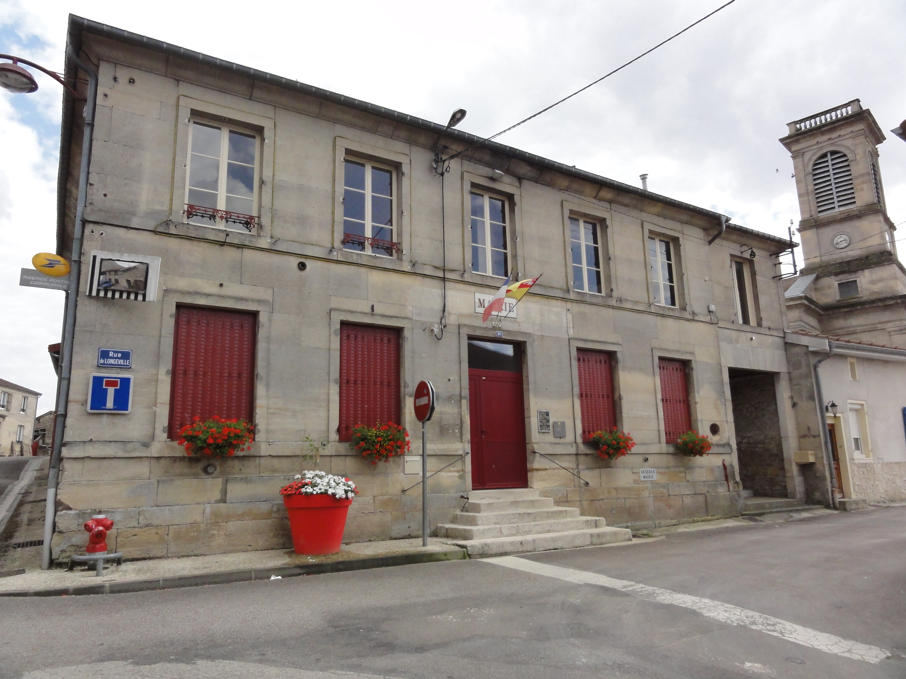 Haironville (Meuse) mairie